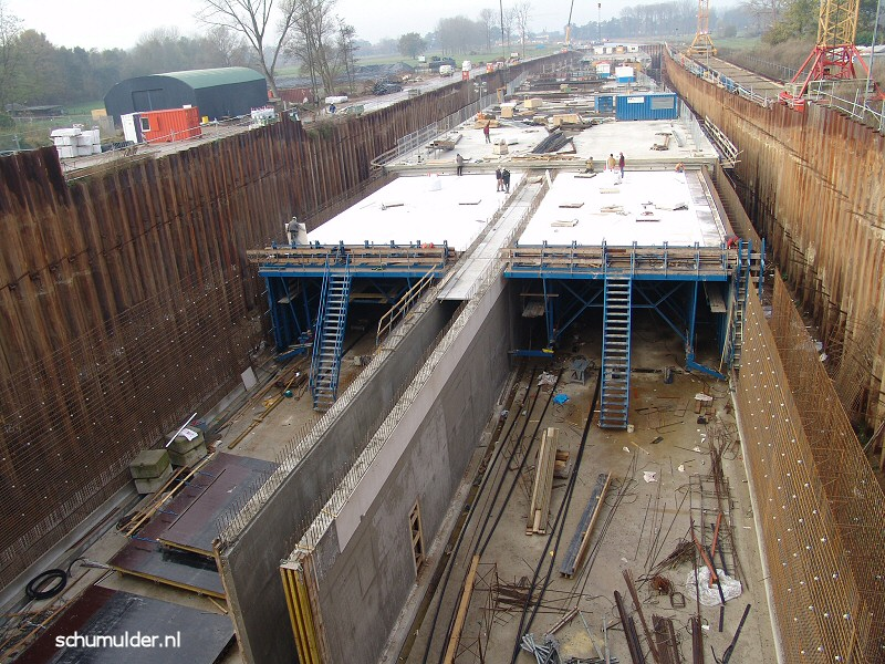 Bouwdok Roertunnel Roertunnel being built